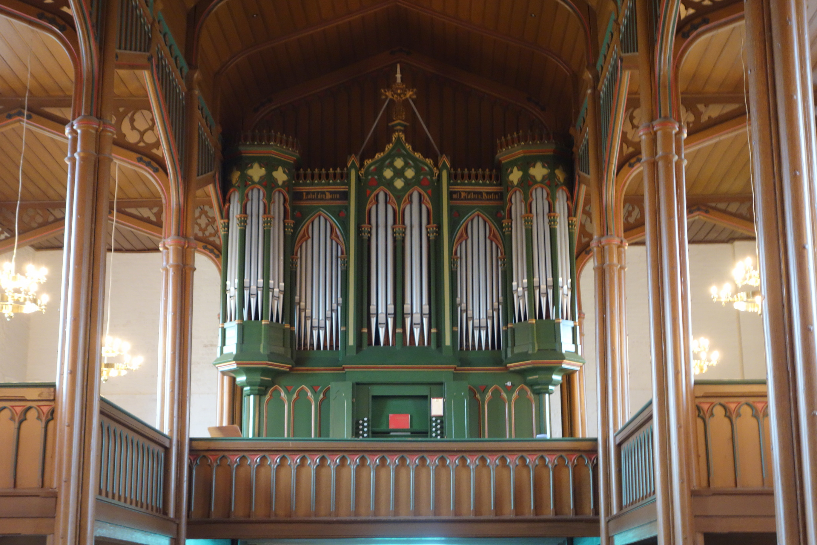 Orgel der Marienkirche Sandesneben, Kreis Herzogtum Lauenburg, Schleswig-Holstein, Deutschland